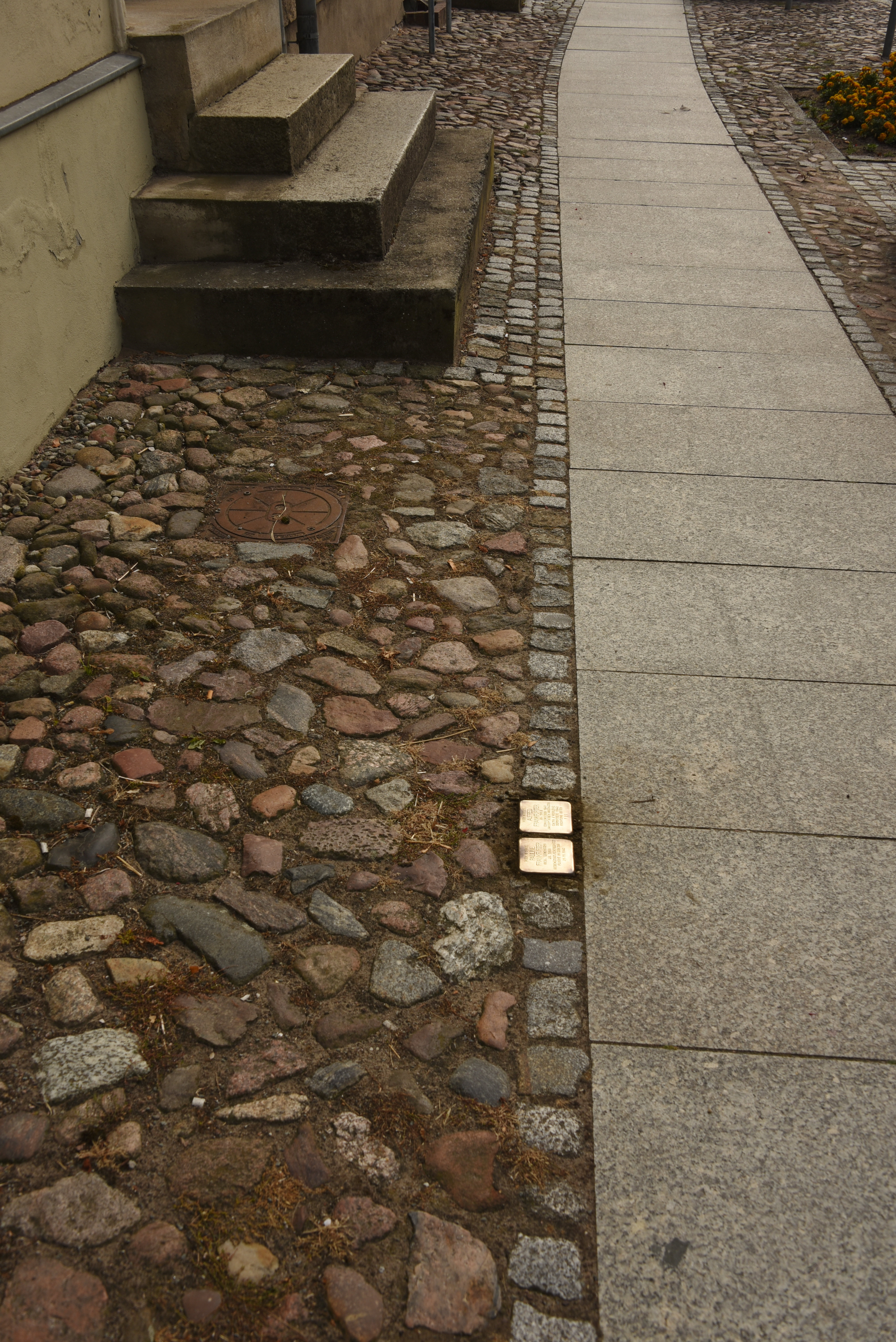 Stolperstein für Alfred und Pauline Frankfurter